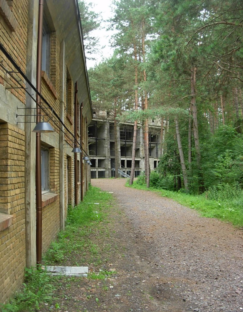 Eksploseum w Bydgoszczy